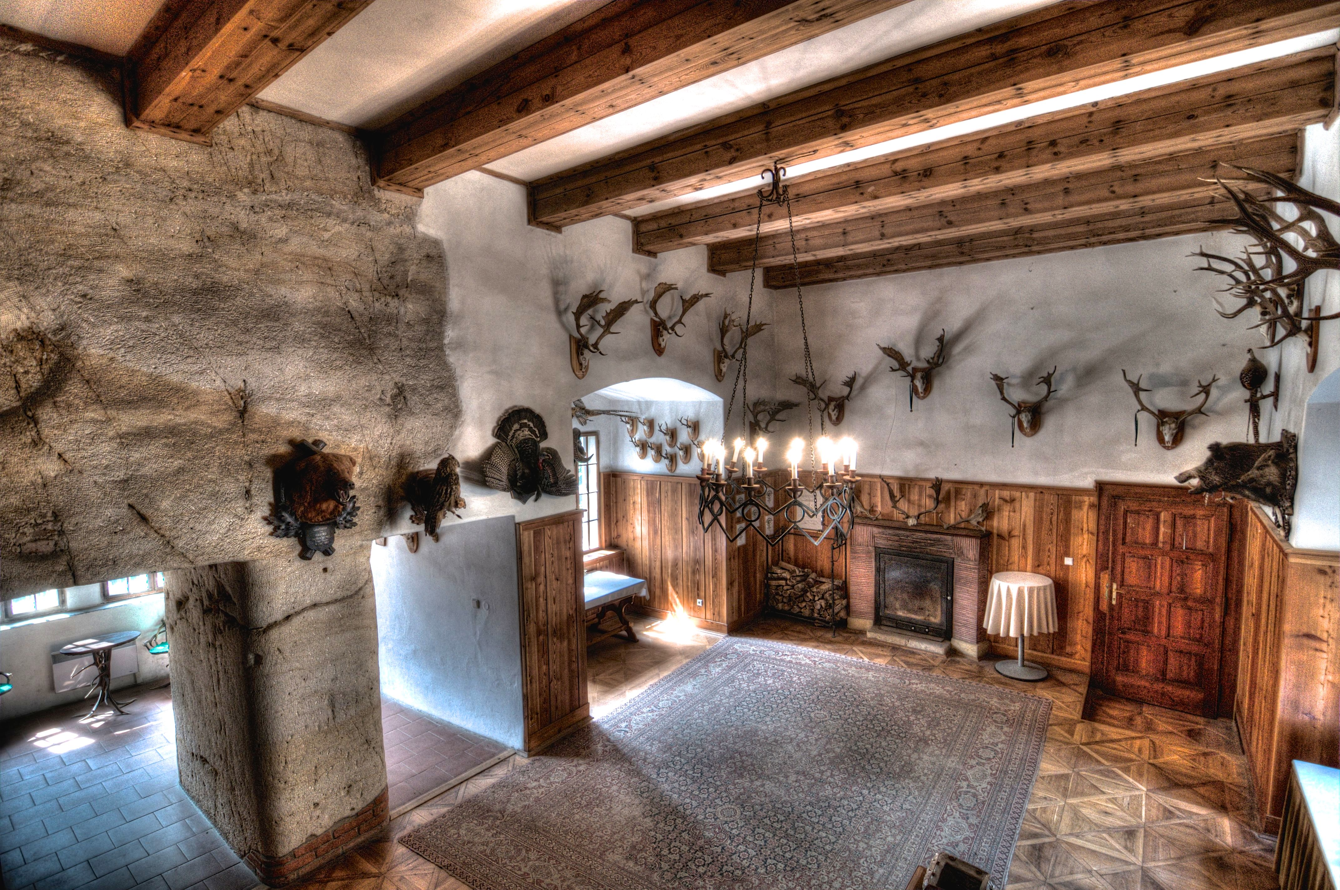 Vstupní hala I. patra